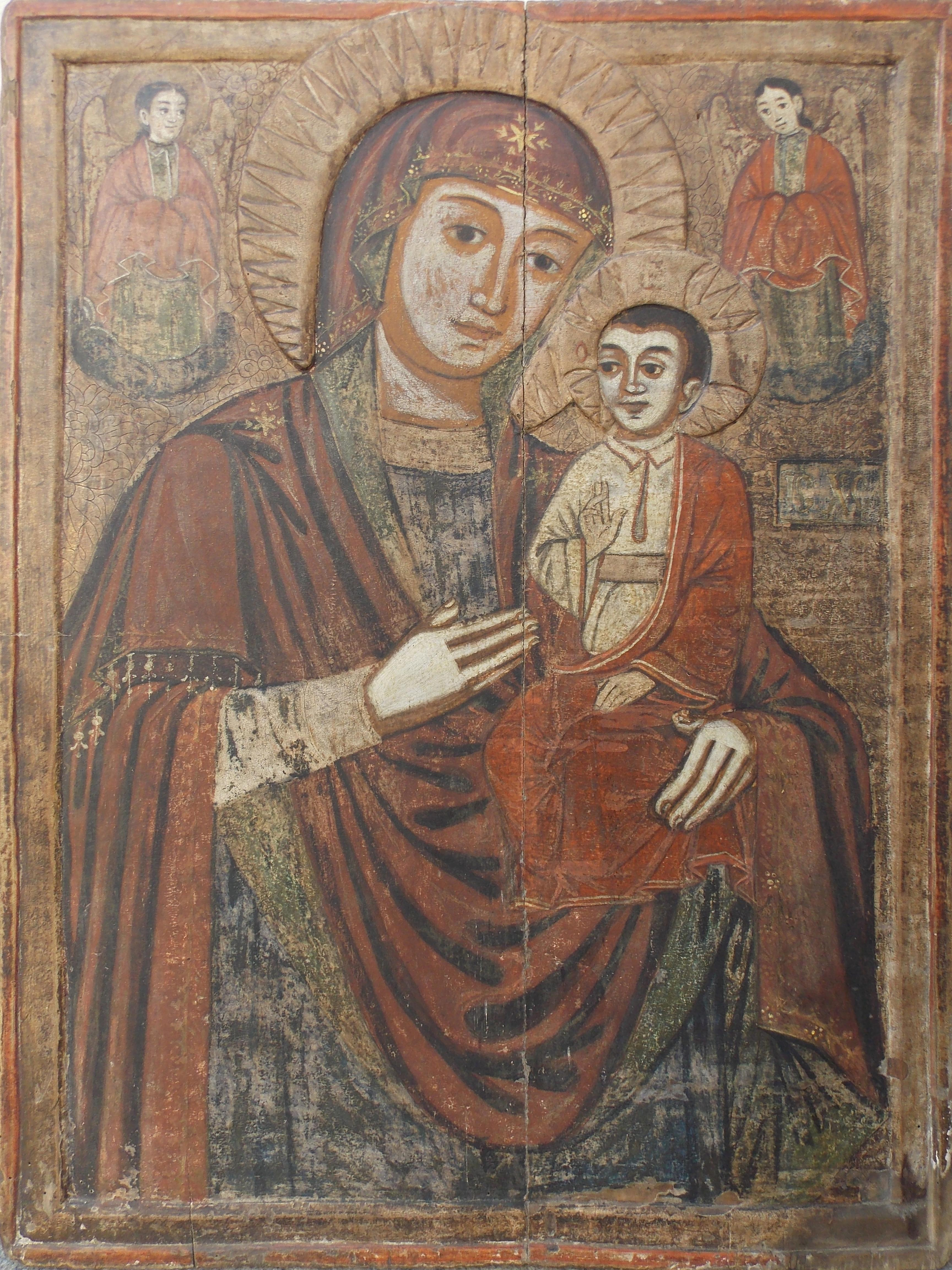 Maria cu pruncul , pictura in ulei pe lemn , realizata in 1740 si atribuita lui Andrei Zugravu din Cornesti, Cluj